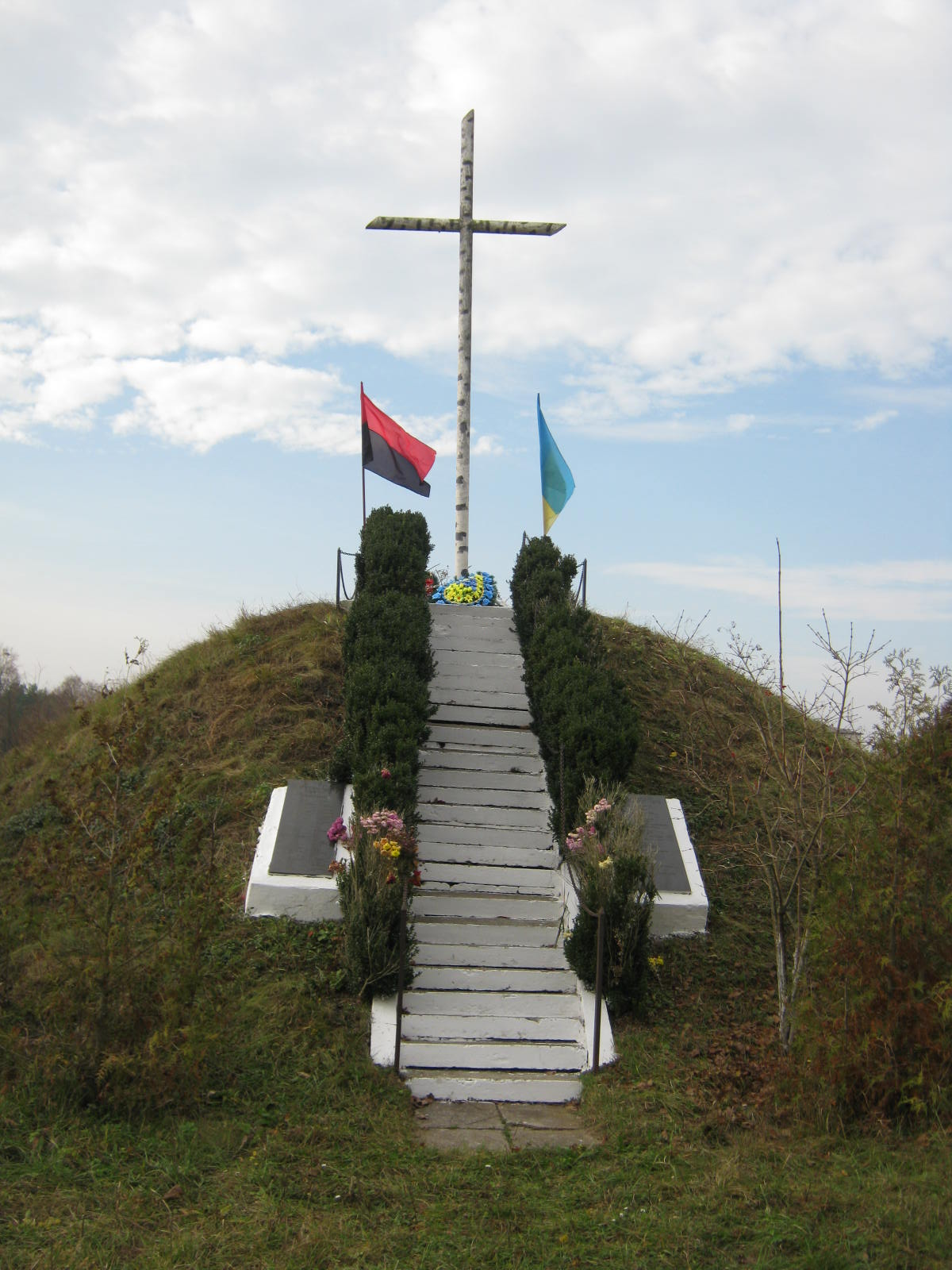 Символічна могила вояків ОУН, УПА. Гора Федір, Бучач